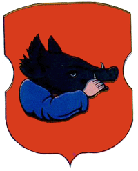 Herb miasteczka Boremel